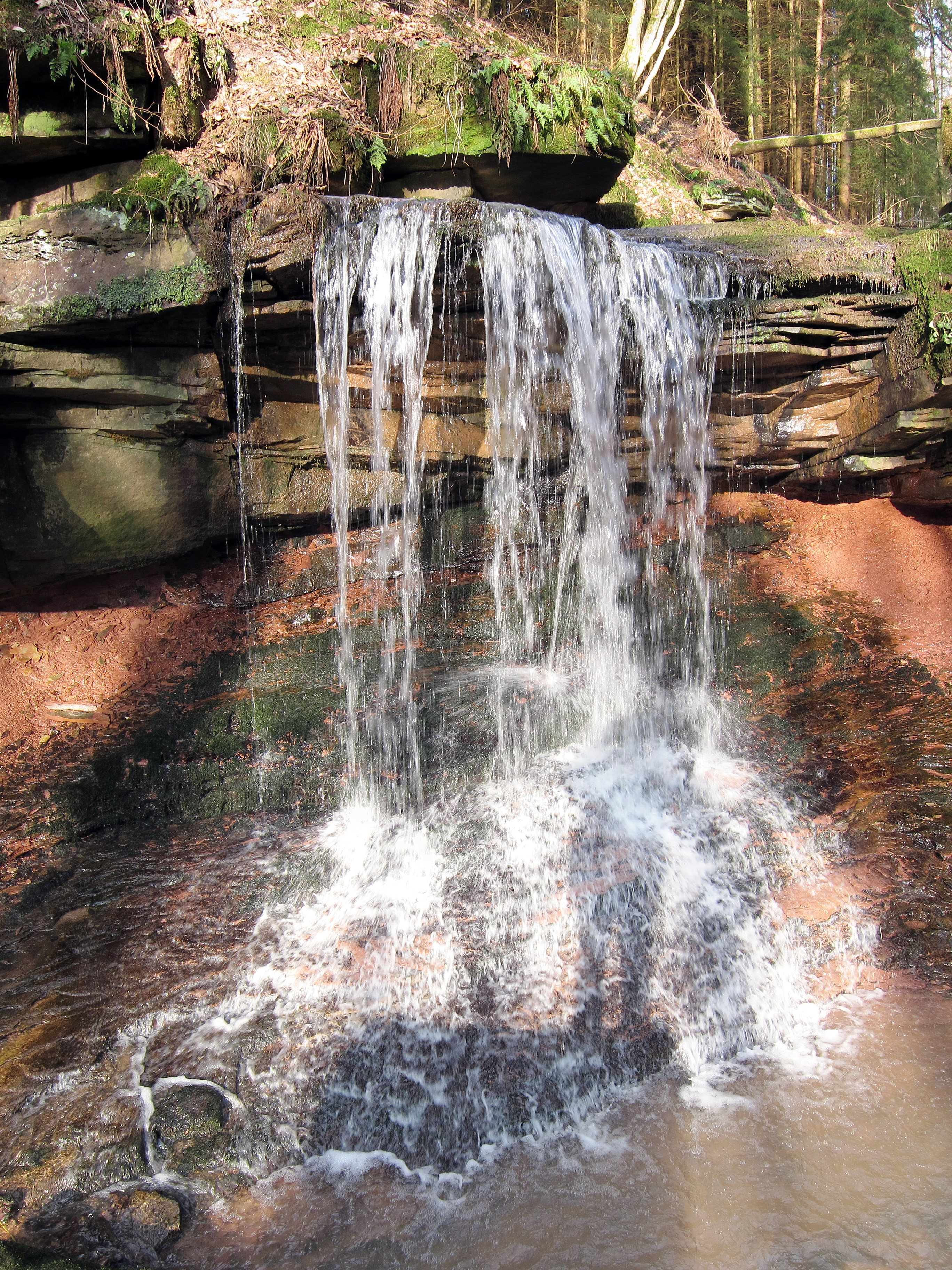 Tretstein-Wasserfall